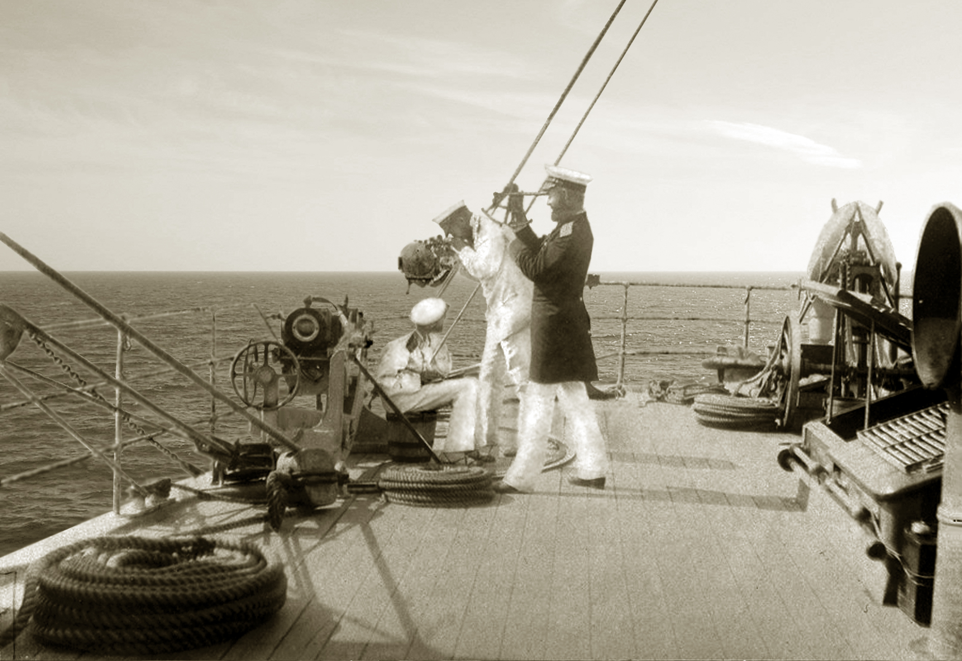 Офицеры Витязя ведут научные наблюдения